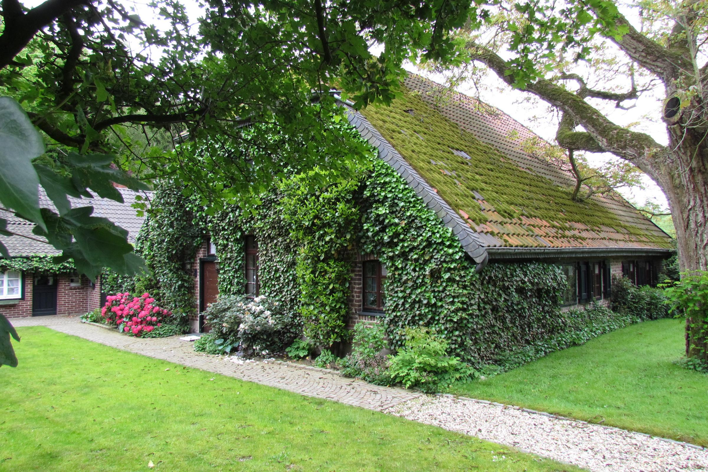 Die Tüschenmühle in Nettetal - Leuth